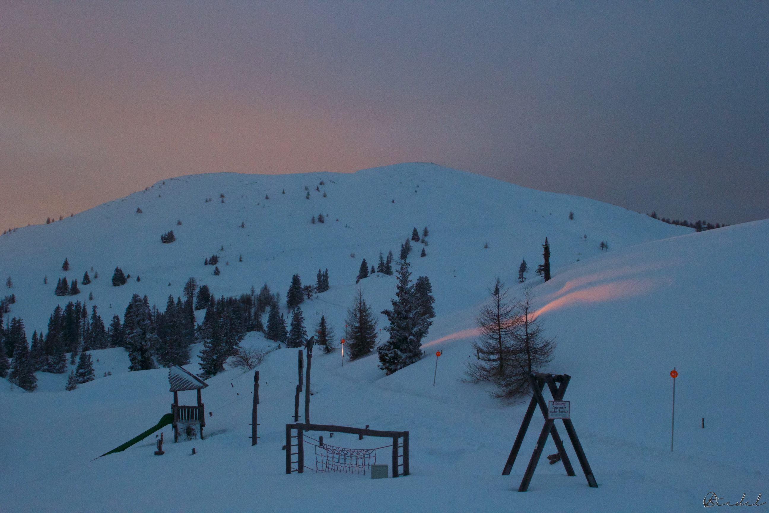 Abendstimmung auf der Rosstratte